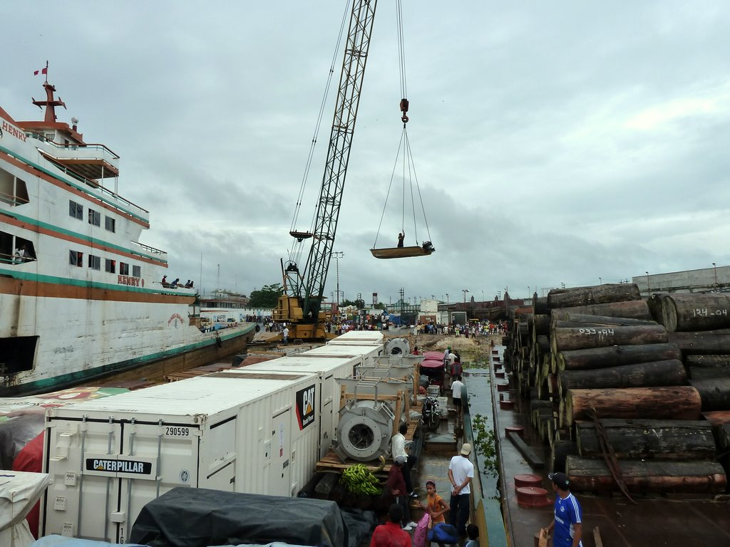 Llegada a Iquitos, en un día muy nublado y lluvioso.